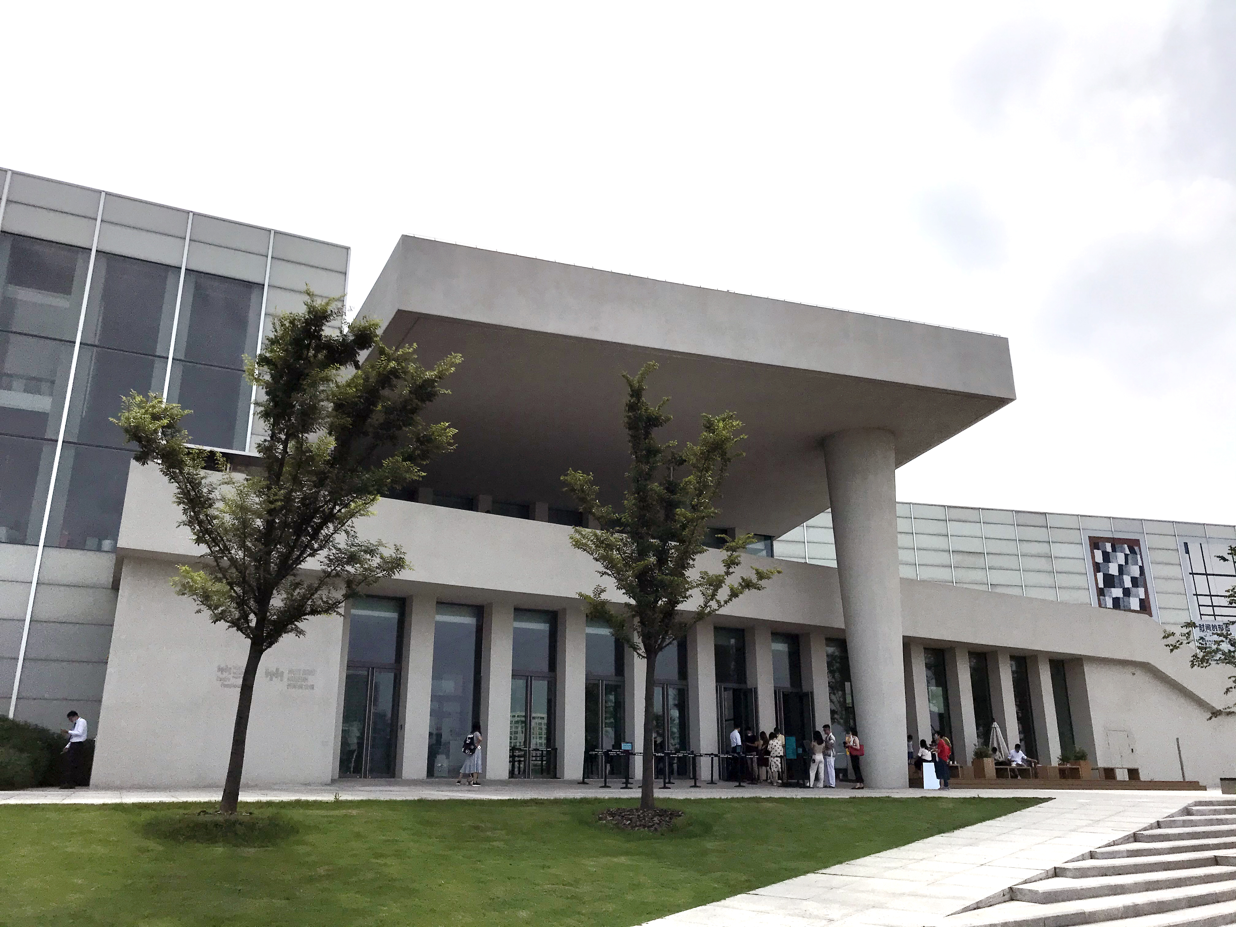 上海西岸美术馆正门